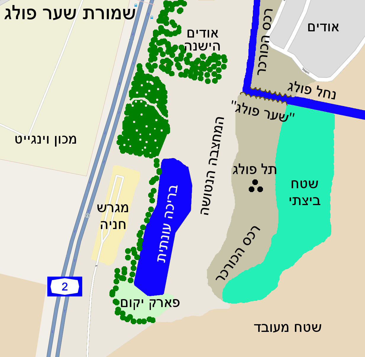 שמורת שער פולג